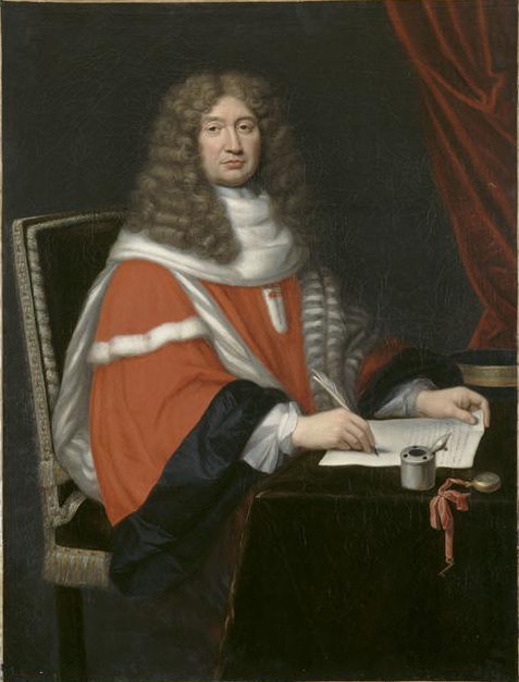 Prévôt des marchands de Paris en 1668, contrôleur-général des Finances et ministre d'Etat en 1683, surintendant des Postes en 1691